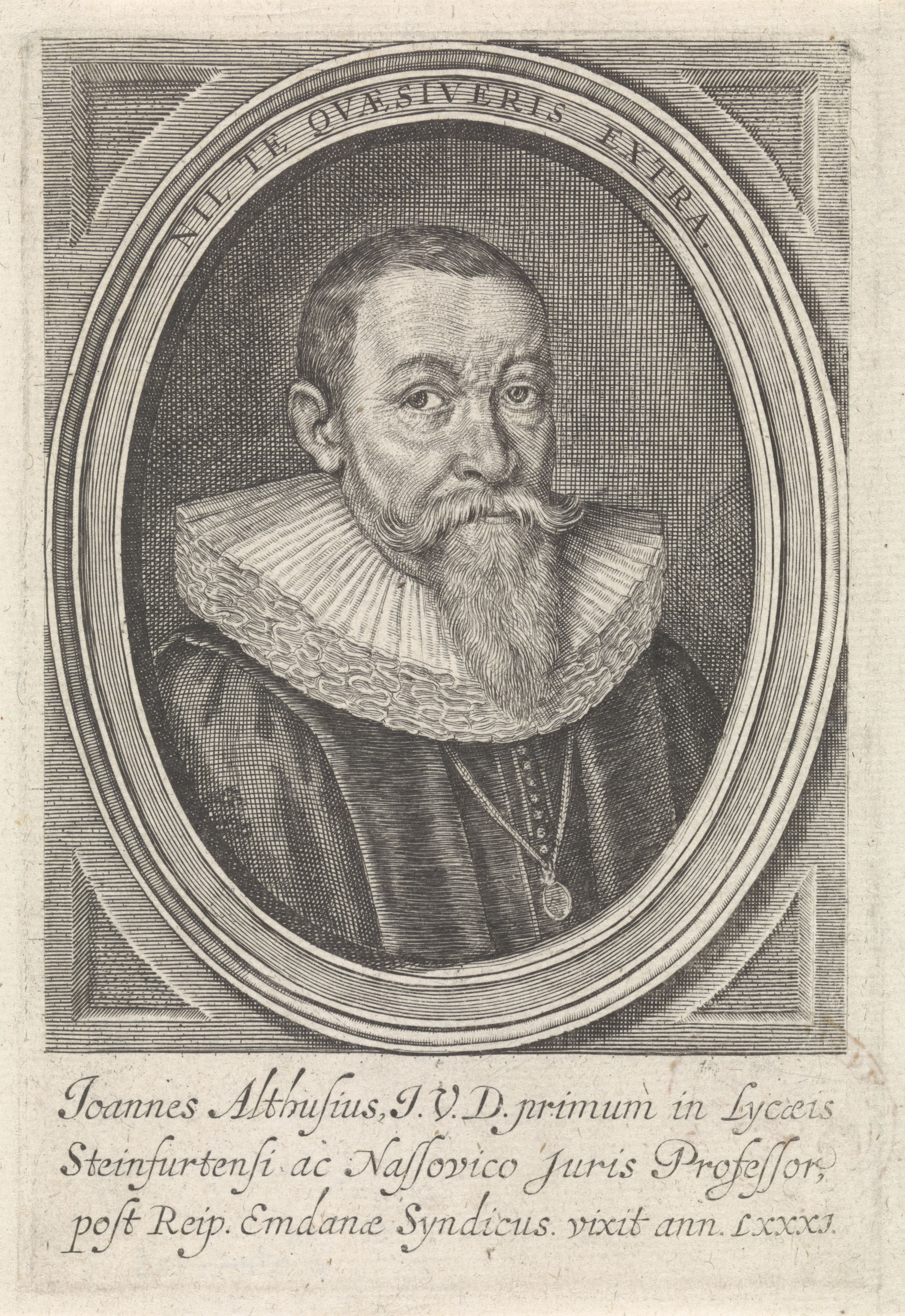 IdentificatieTitel(s): Portret van Johannes AlthusiusObjecttype: prent Objectnummer: RP-P-OB-16.077Catalogusreferentie: Hollstein Dutch 23Van Someren 103Opschriften / Merken: verzamelaarsmerk, verso linksonder, gestempeld: Lugt 240Omschrijving: Portret van de Duitse calvinist Johannes Althusius, syndicus te Emden. In het randschrift van de omlijsting zijn devies in het Latijn. In de marge een drieregelig onderschrift in het Latijn.VervaardigingVervaardiger: prentmaker: Crispijn van de Passe (II)Plaats vervaardiging: onbekendDatering: 1604 - 1670Fysieke kenmerken: gravureMateriaal: papier Techniek: graveren (drukprocedé)Afmetingen: plaatrand: h 153 mm × b 104 mmOnderwerpWie: Johannes AlthusiusVerwerving en rechtenVerwerving: overdracht van beheer 1816Copyright: Publiek domein